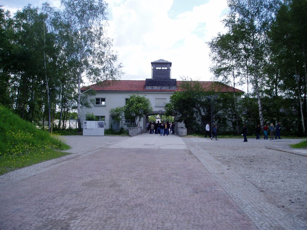 Concentration Camp Dachau, Entrance